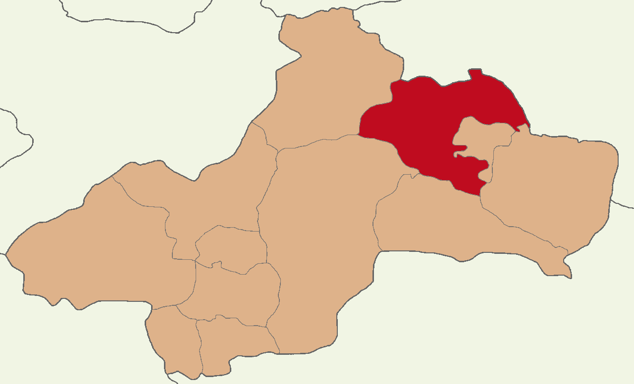 Niksar ilçesinin konumu